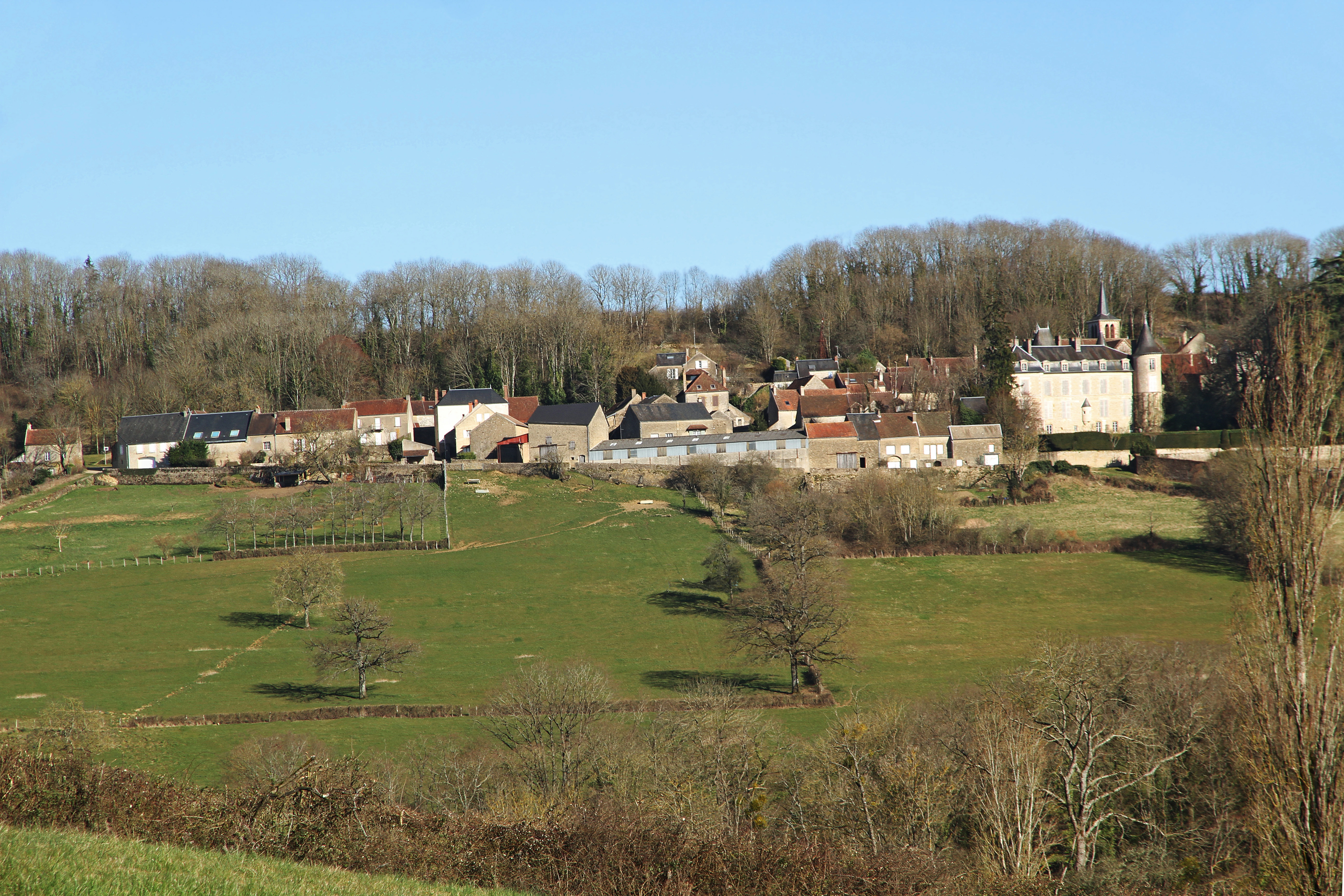 Vue de Tharoiseau depuis la colline de Fontette